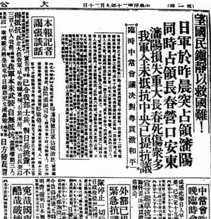 1931年9月20日《大公報》新聞內容